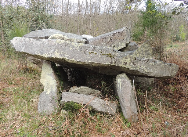 Dolmen de la Pidoucière, entrée avec une table penchée vers la droite et dépassant latéralement par rapport aux orthostats (dont celui de droite est penché vers la gauche, vers l'intérieur). Un autre semble avoir été placé pour barrer l'entrée qui est tombé aussi vers l'intérieur entre les deux latéraux, On apercoit derrière la première une deuxième table, cassée en deux elle? Herbes diverses autour et branche au dessus de la table à droite